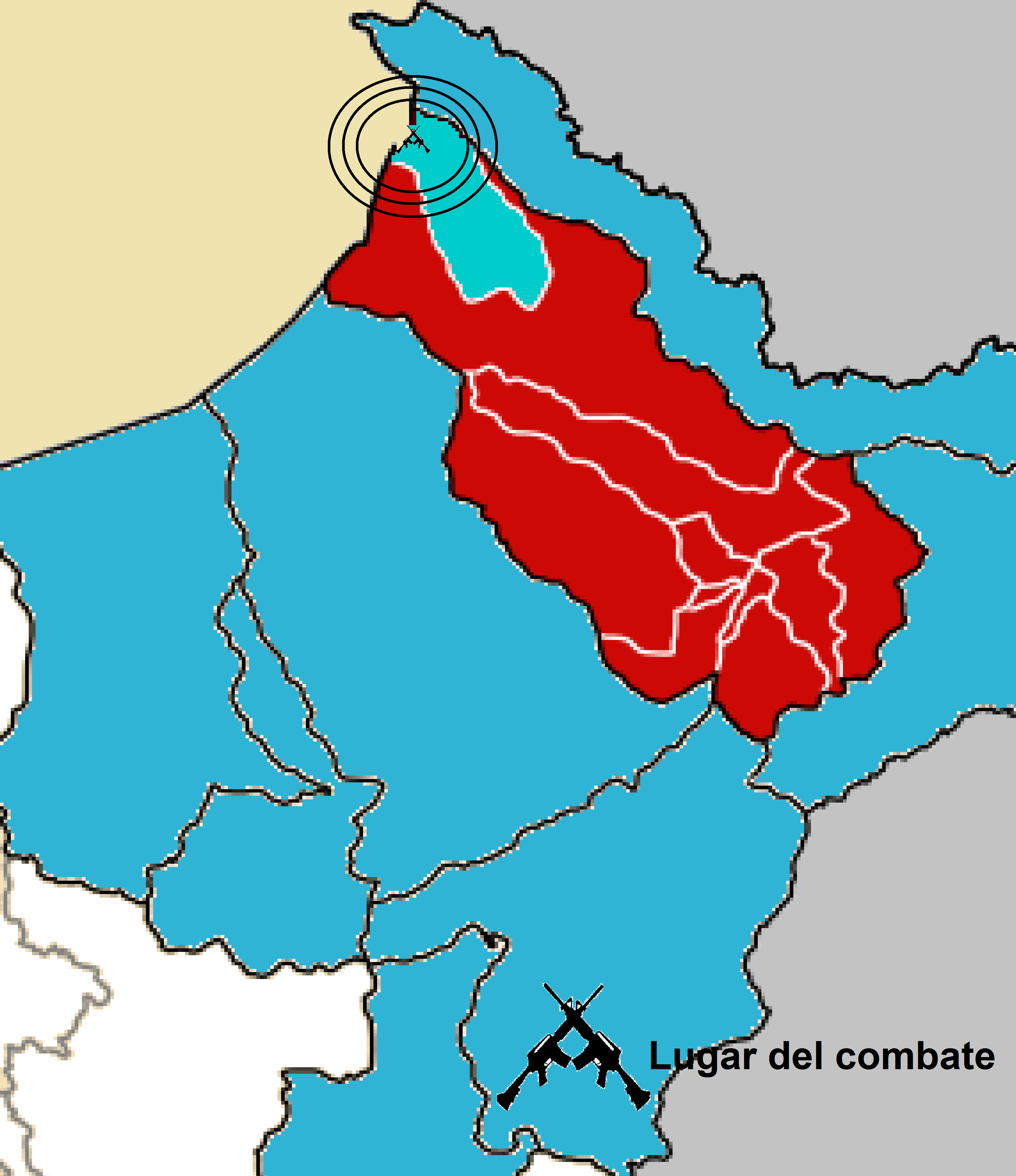 Lugar de la Batalla de Rocafuerte con las fronteras actuales